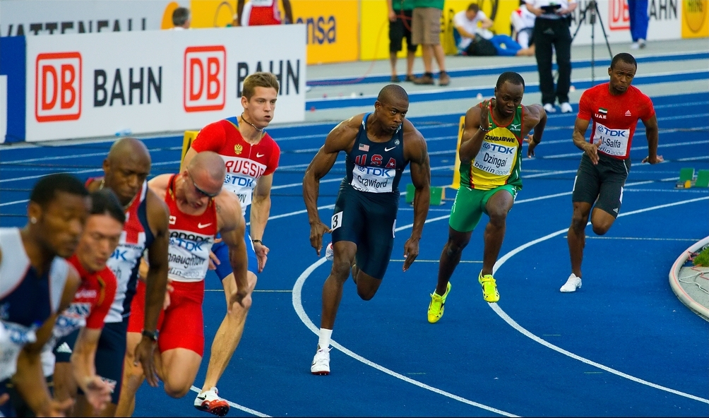 Shawn Crawford während seines 200m Semifinales